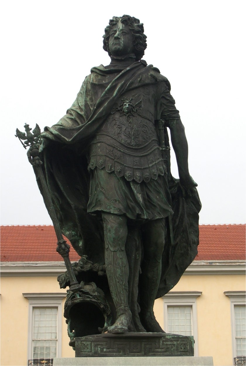 Denkmal Kurfürst Friedrich III. von Andreas Schlüter